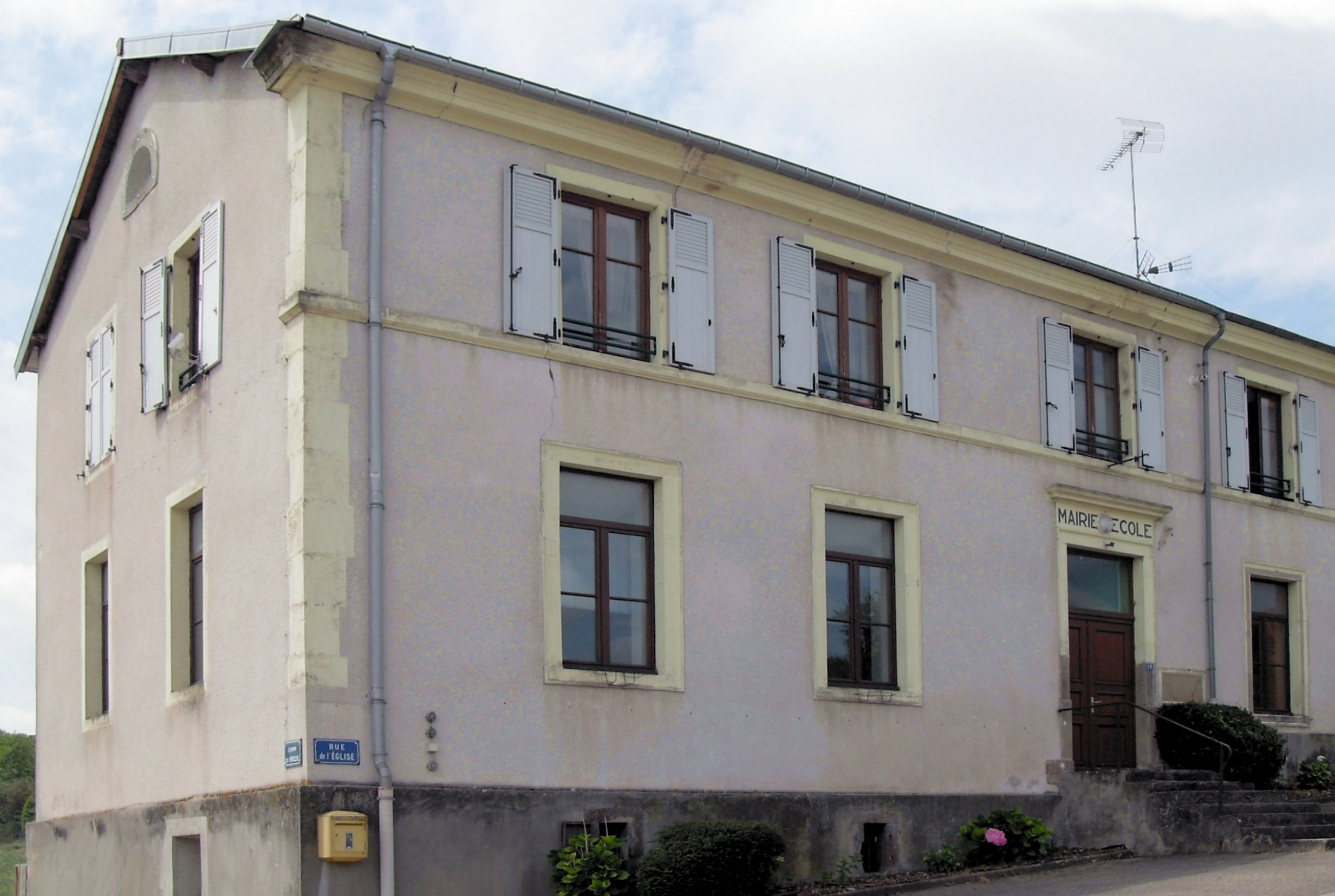 La mairie-école de Gugney-aux-Aulx